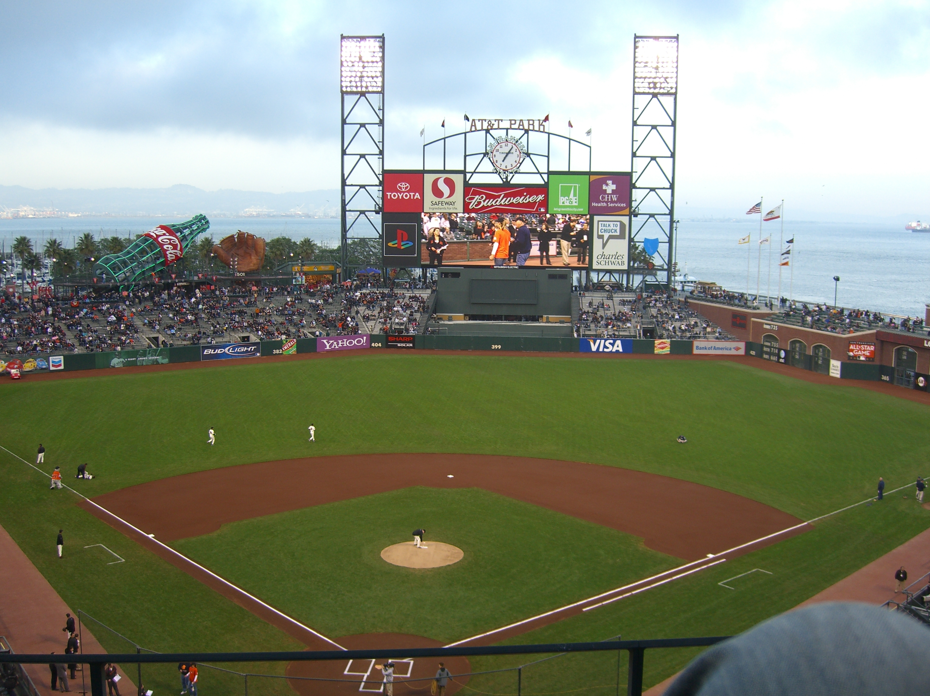 AT&T Park